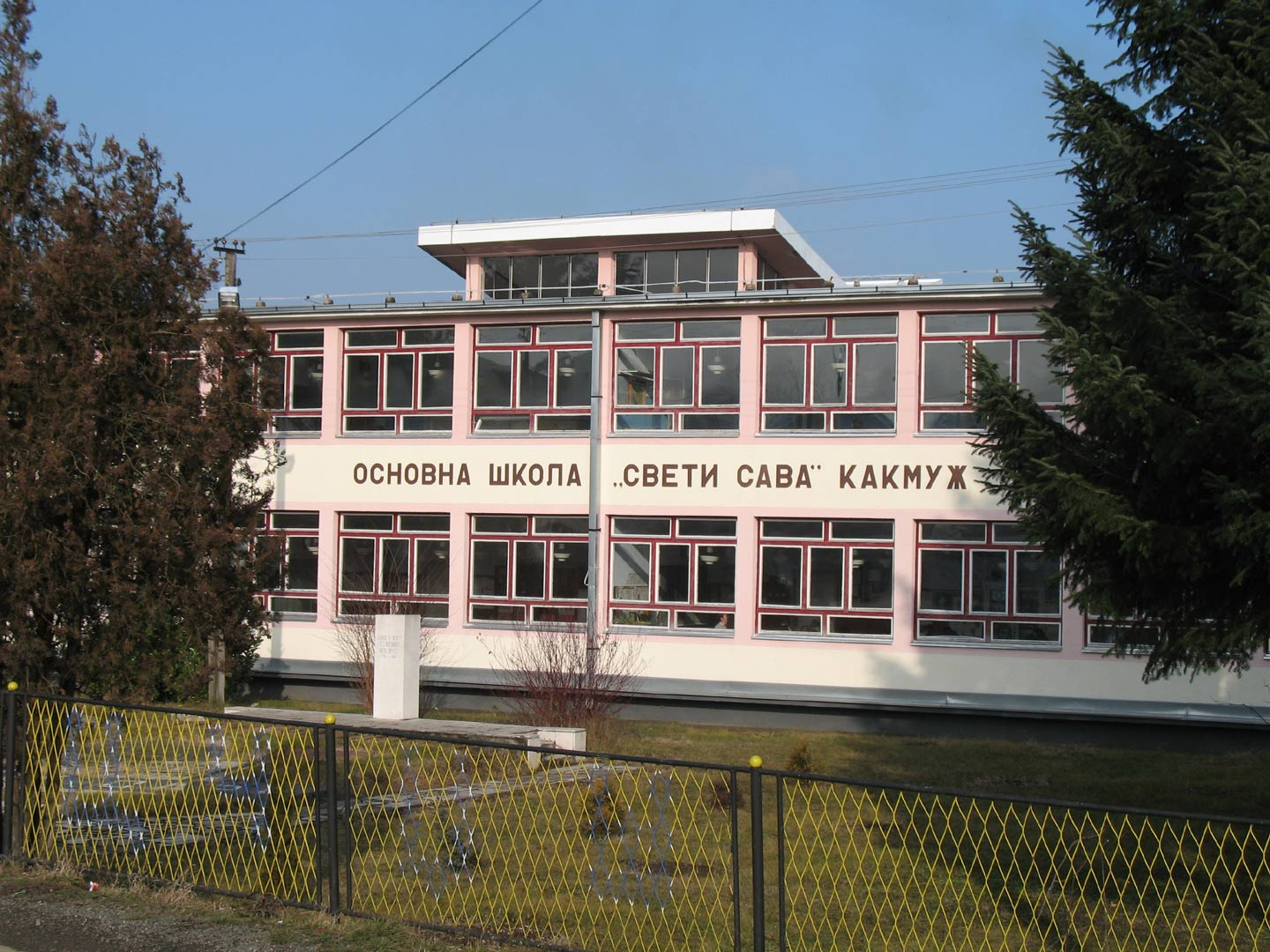 основна школа `Свети Сава` у Какмужу